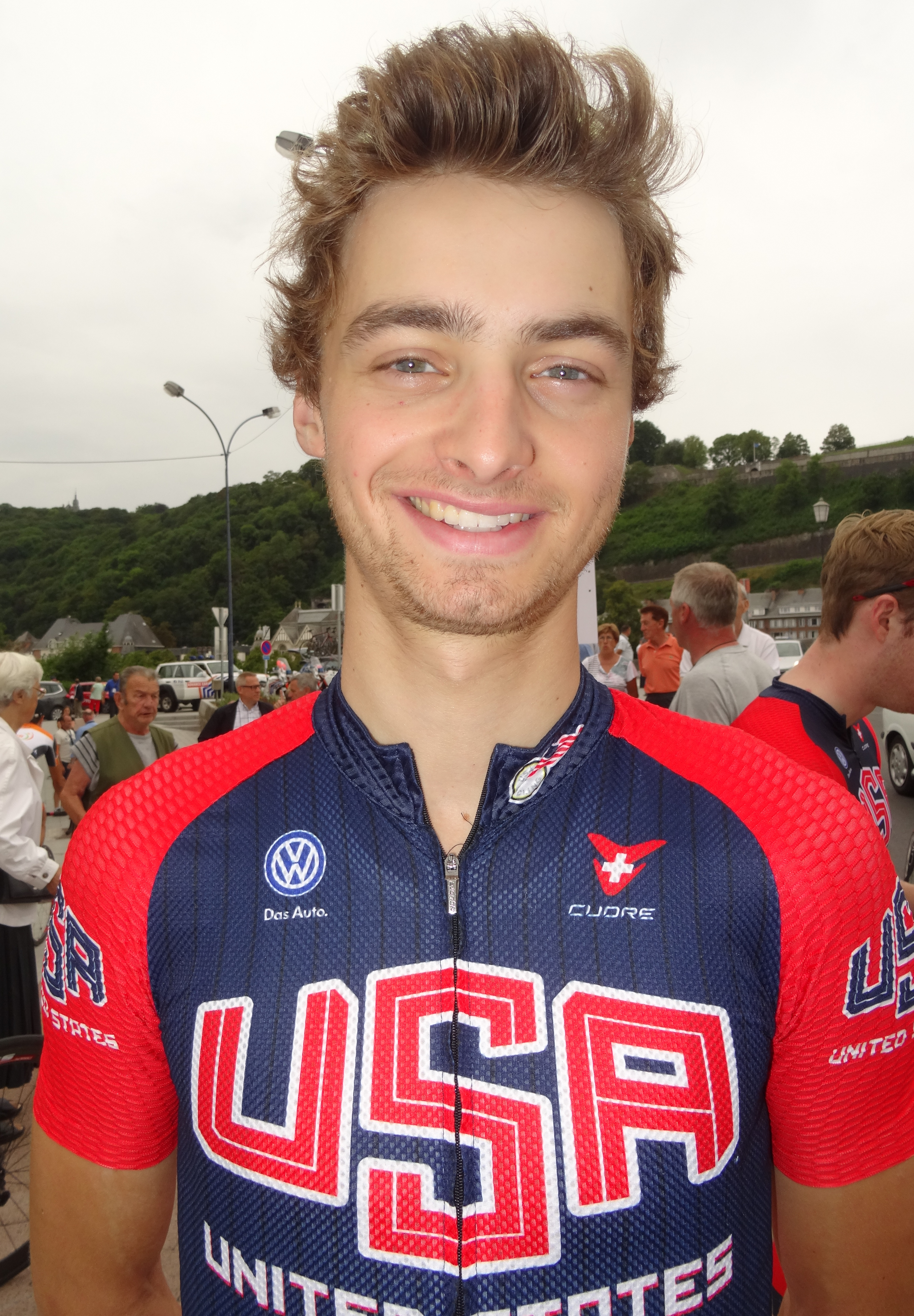 Reportage photographique réalisé le mercredi 6 août à l'occasion du départ de la première étape du Tour de la province de Namur 2014 à Jambes (Namur), Belgique.